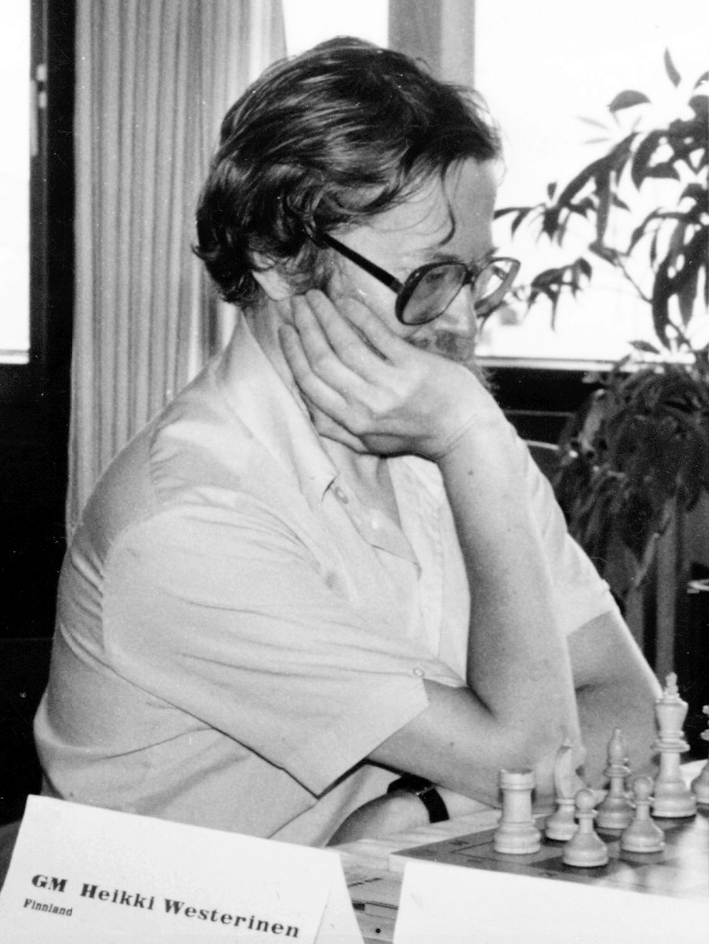 Heikki Westerinen, 1987 in Altensteig